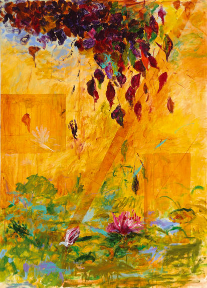 Danièle Rochon, Thrusting Out, 2008, acrylique sur toile, 120 cm x 80 cm. Collection de l'artiste